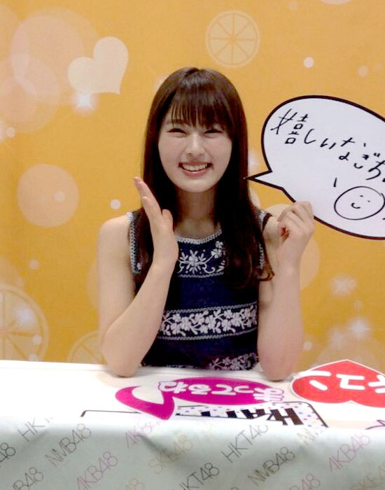 2017.06.24 슛사인 마쿠하리 메세 개별 악수회-우카, 나기사, 미루 - 시부야 나기사 3장(코멘트회 당첨)